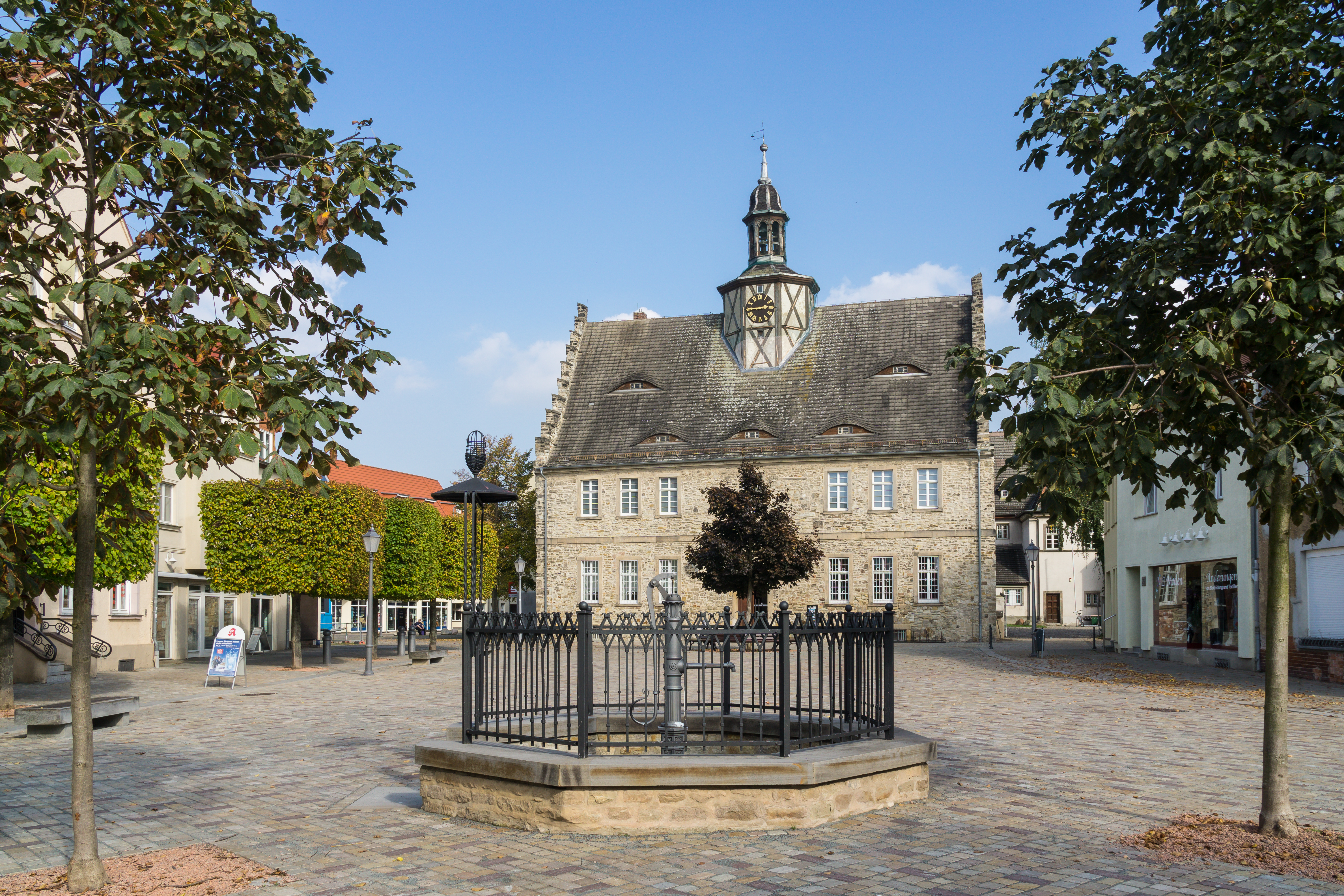 Rathaus Pfännerstraße 41 in Schönebeck OT Bad Salzelmen